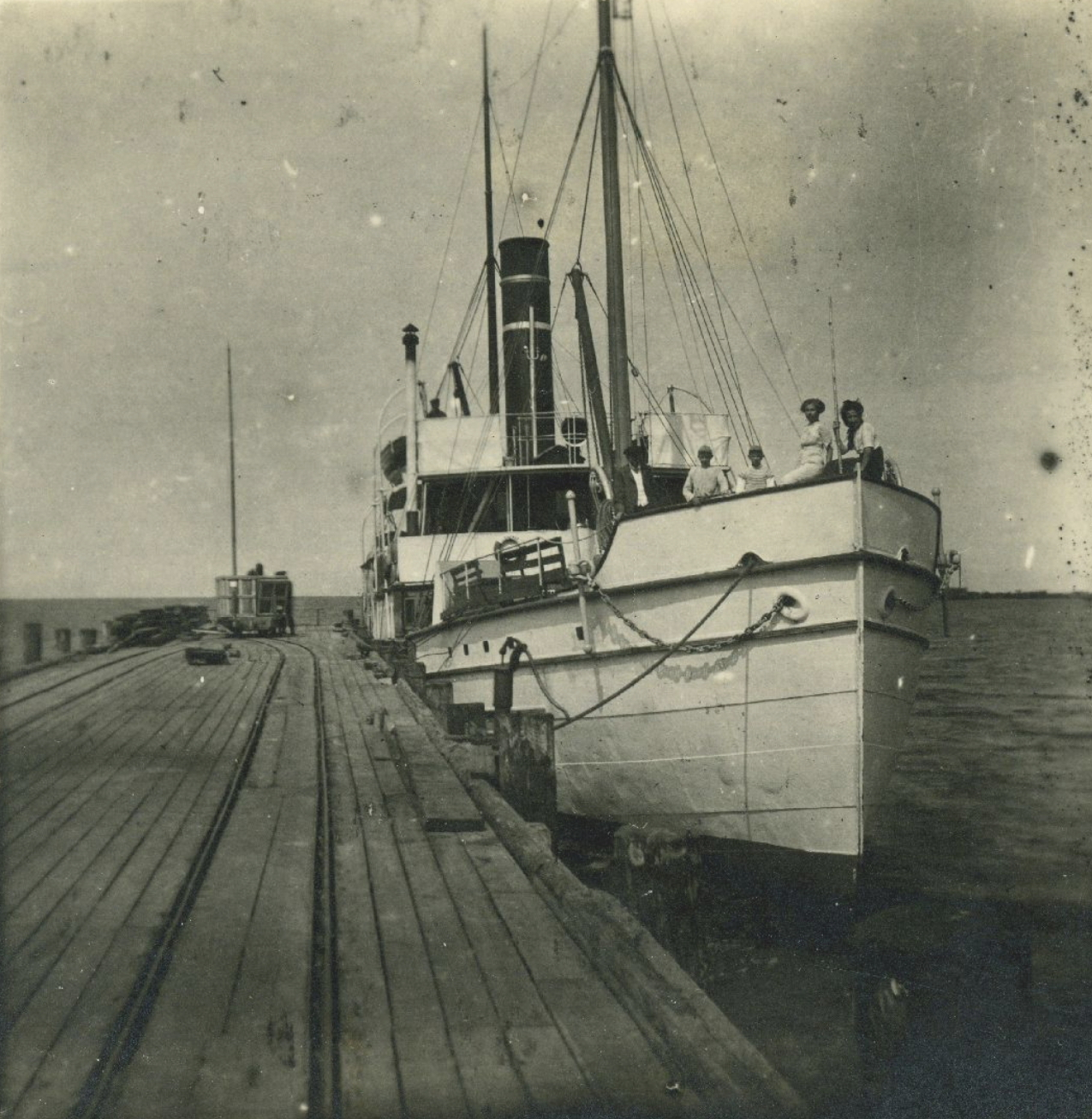 Jaagarahu sadam